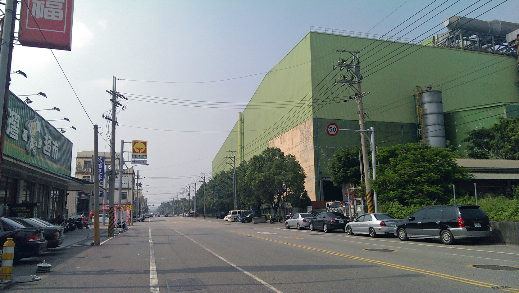 中文（台灣）: 甲后路后里市區段